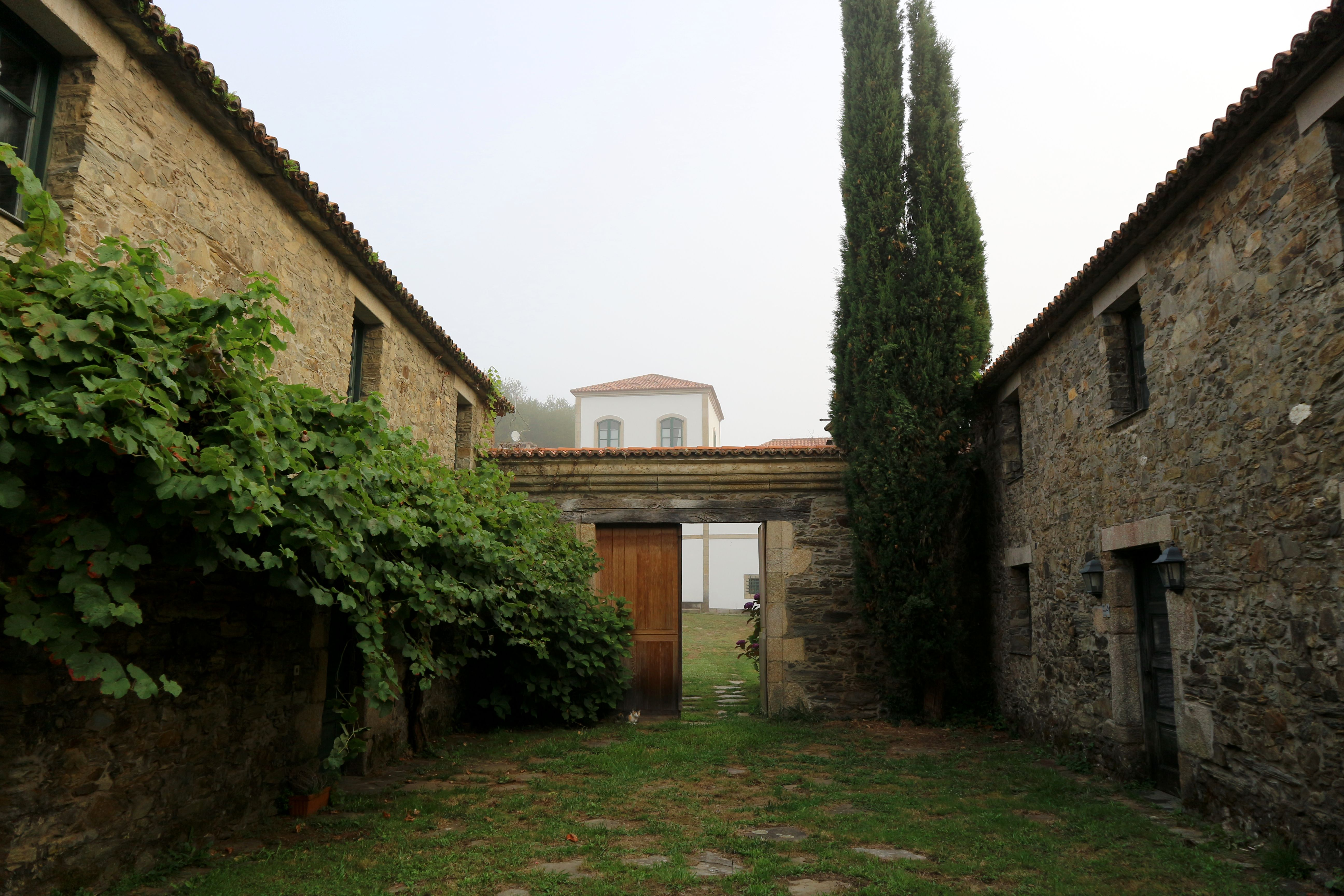 Pazo de Macenda, en Macenda, Crendes, Abegondo.